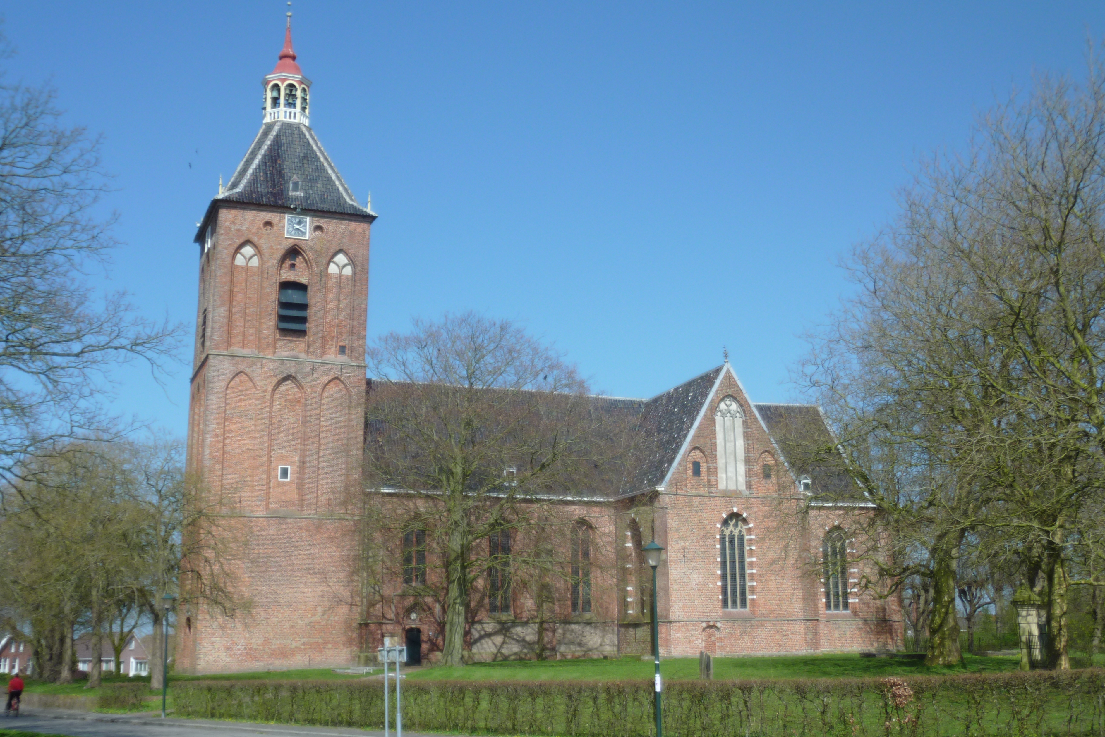 Kerk van Middelstum